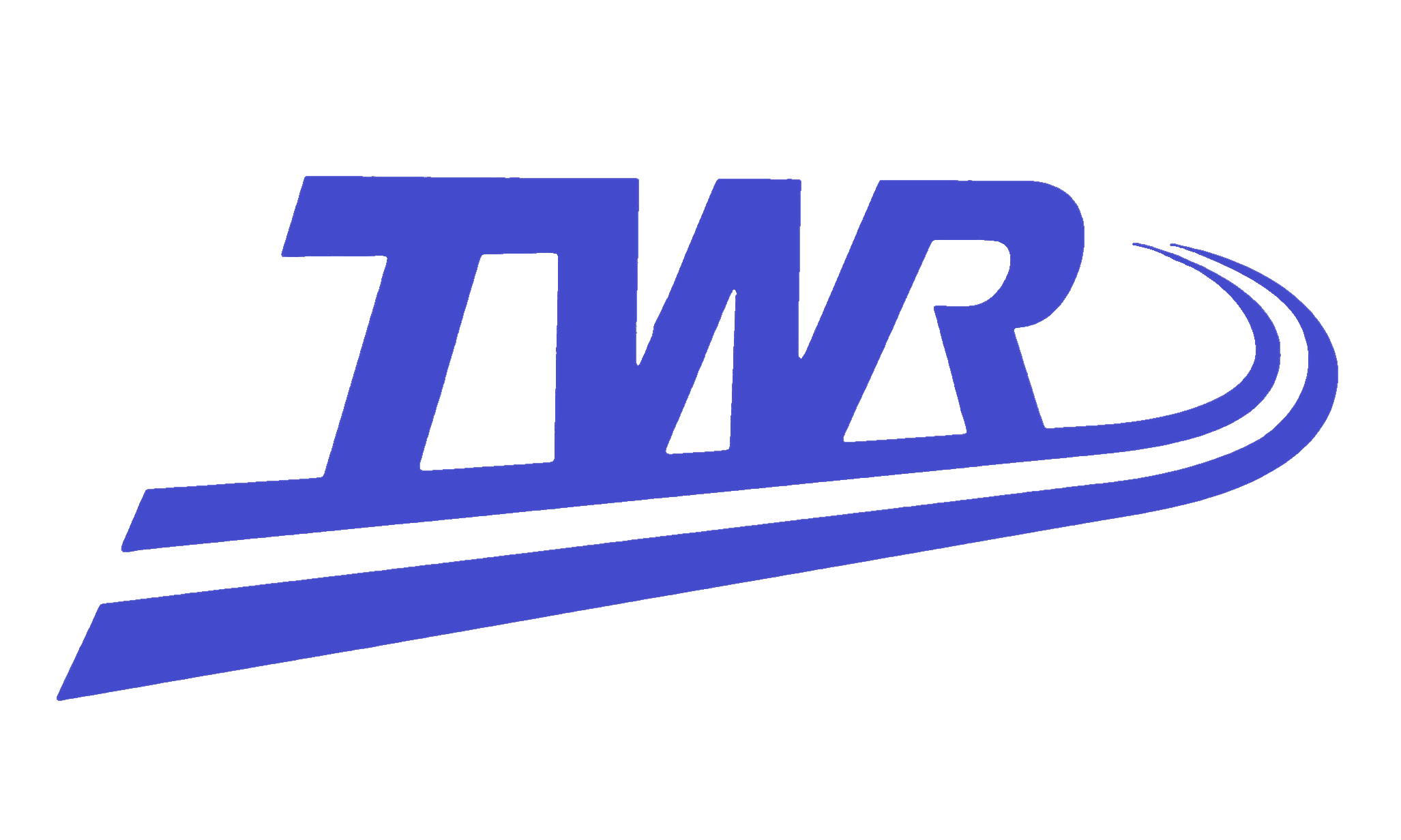 東京臨海高速鉄道自社車両に貼りつけてあるロゴマークを撮影、トリミングしたものです。